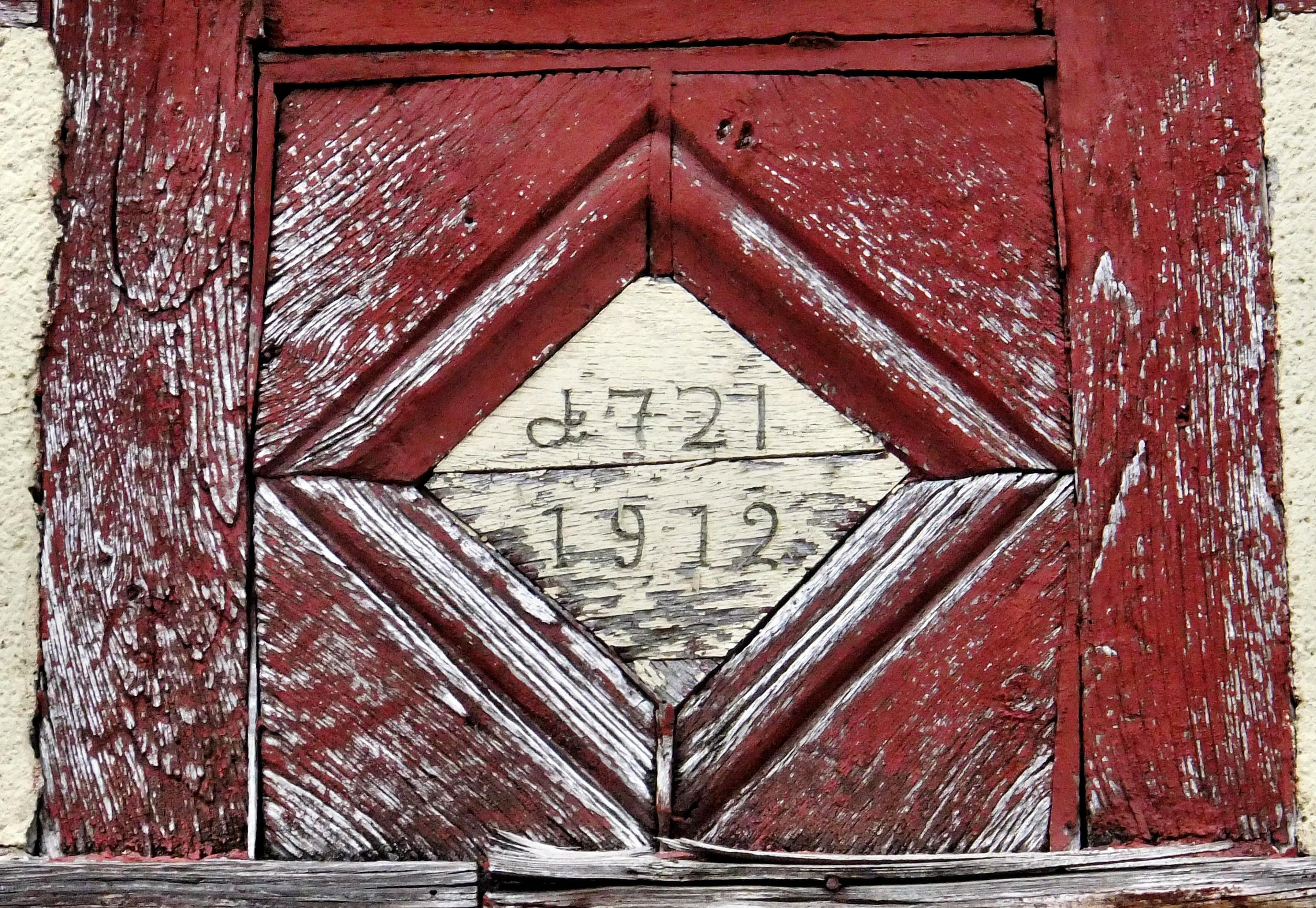 Initialen am Alten Forsthaus der rheinhessischen Ortsgemeinde Gimbsheim in Rheinland-Pfalz (Deutschland), die Rückschlüsse auf seinen Bau und seine große Restaurierung geben: 1721 (oben) und 1912 (unten)